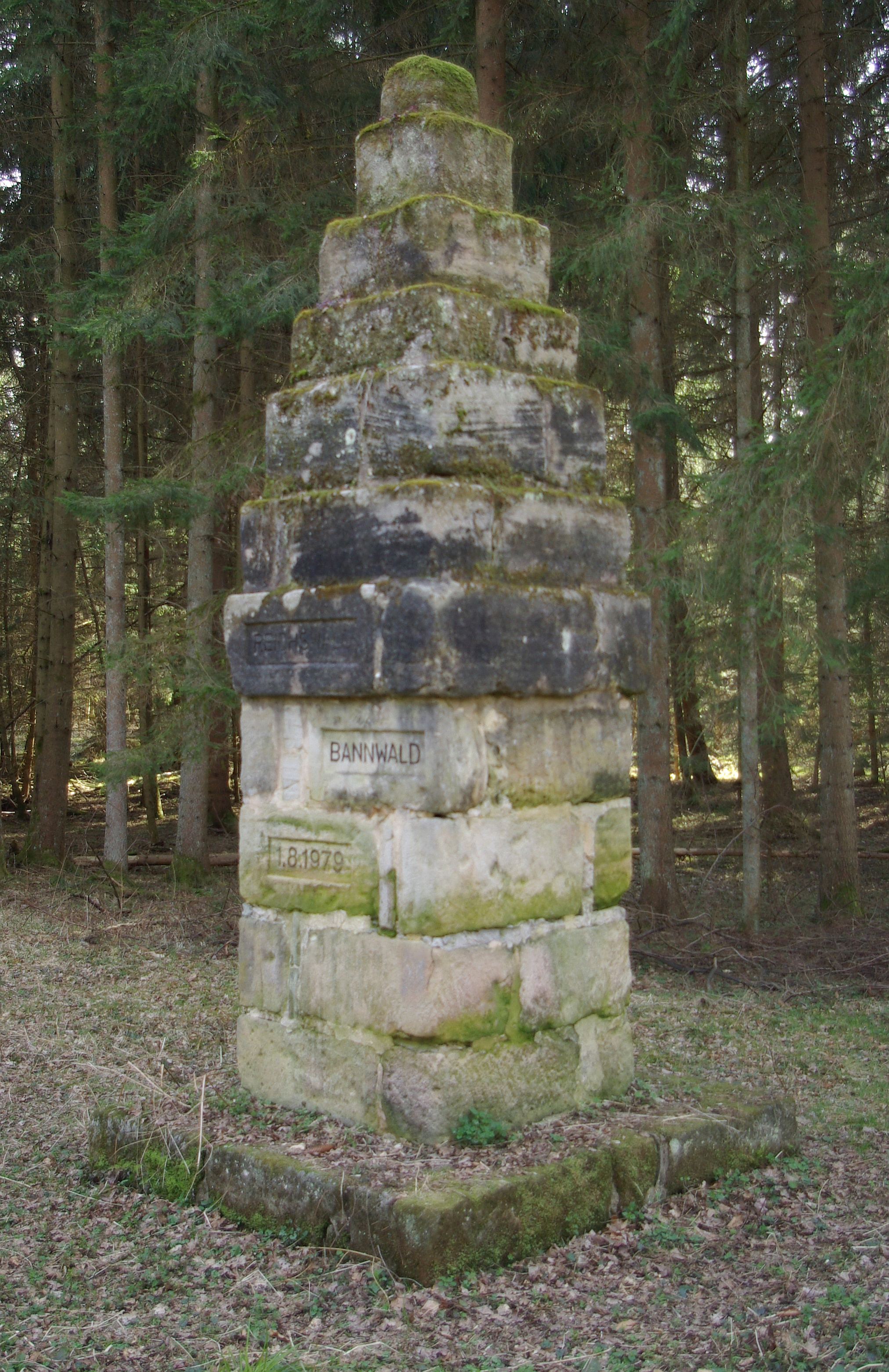 Bannwald-Denkmal im Selbalder Reichswald im Dormitzer Forst